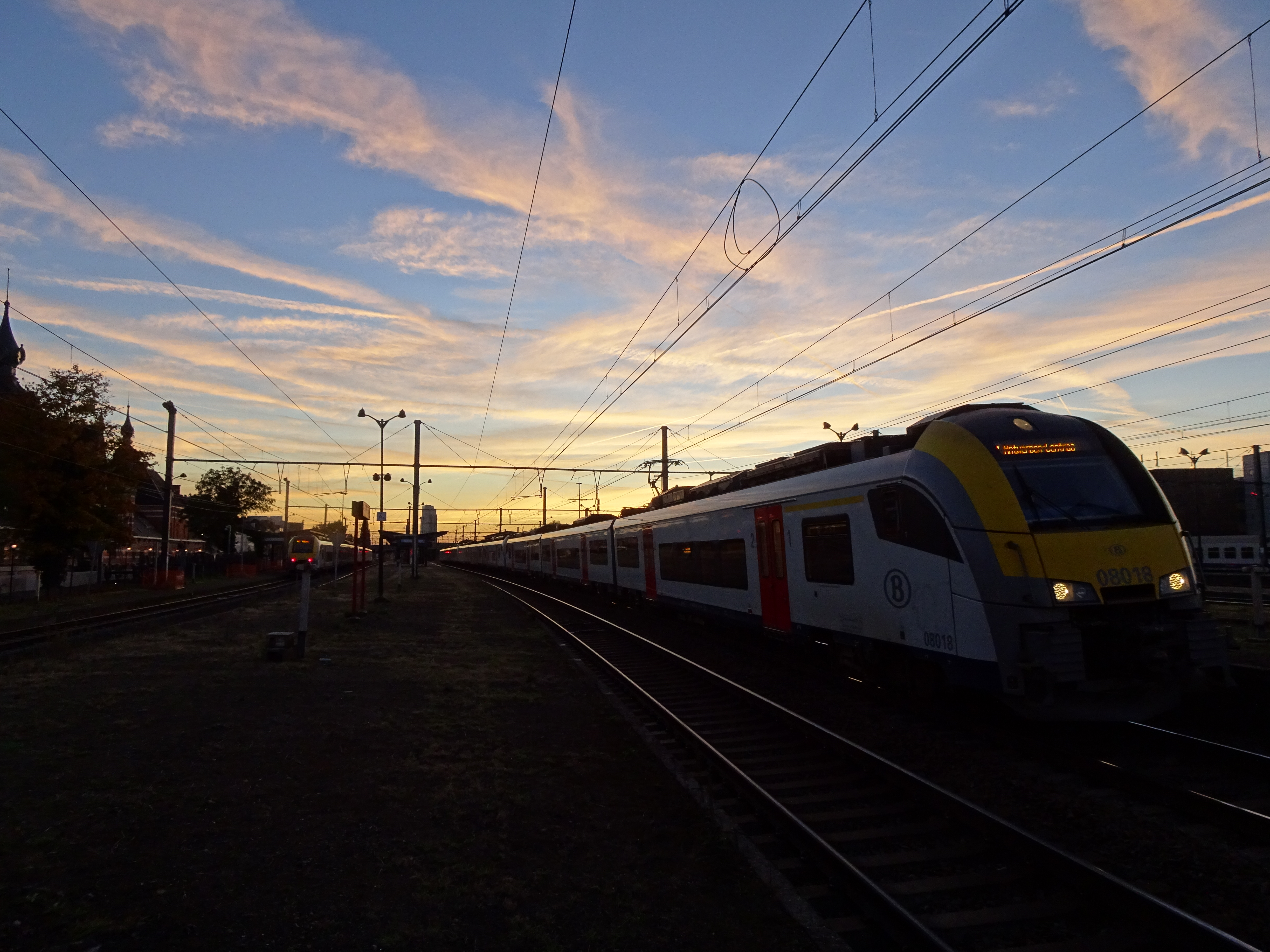 A nine-car S1 train awaiting departure at Schaerbeek station